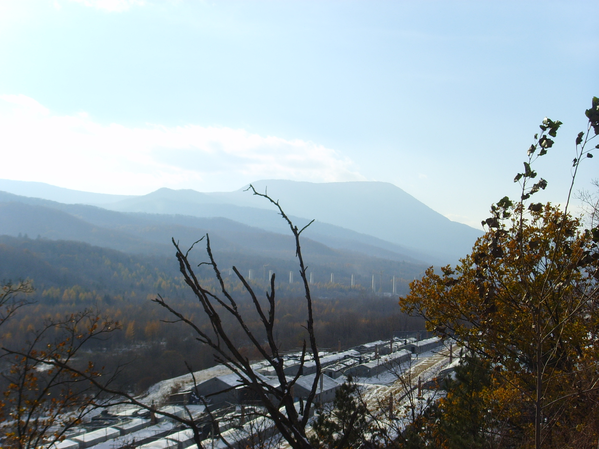 青山里--베개봉